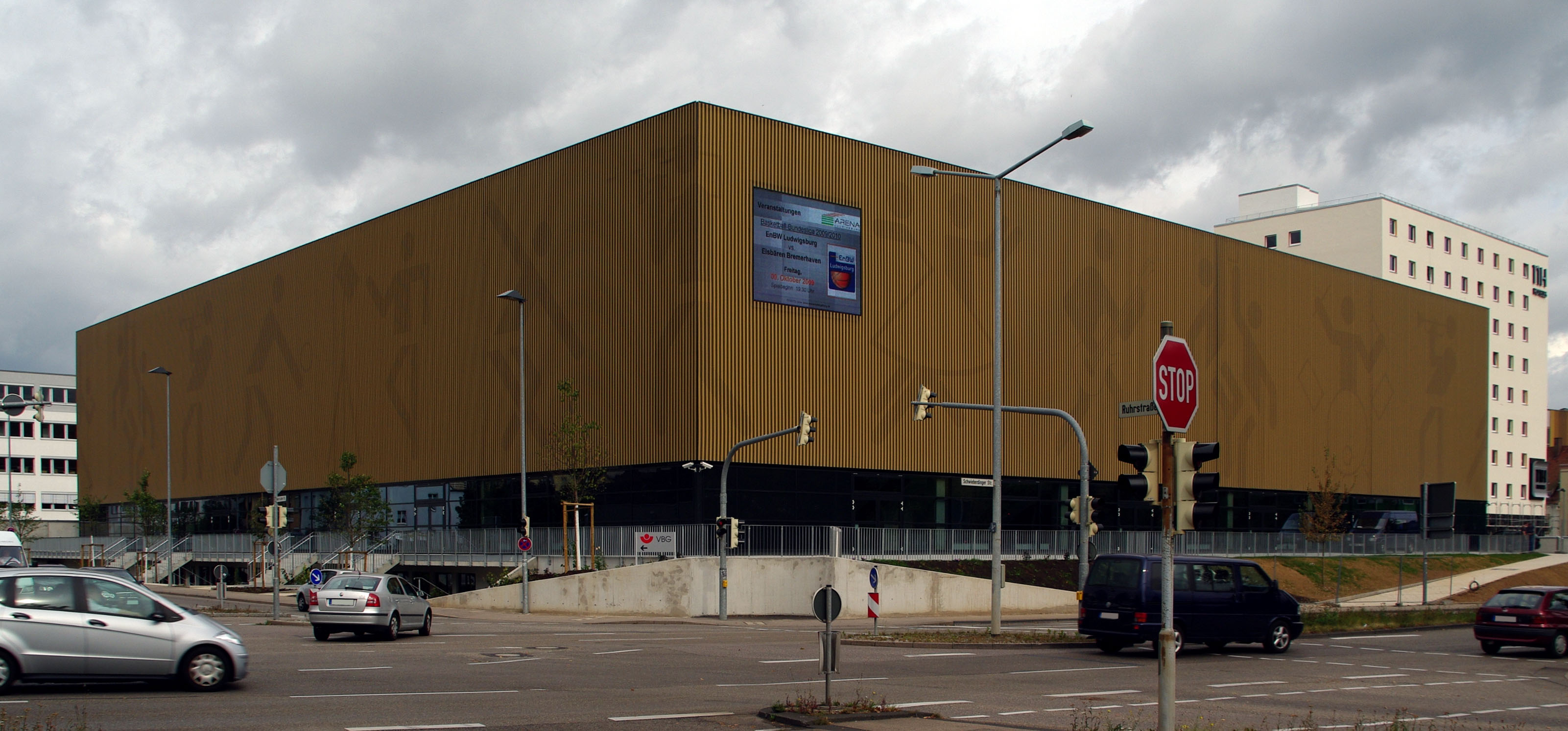 Die neue Arena in Ludwigsburg